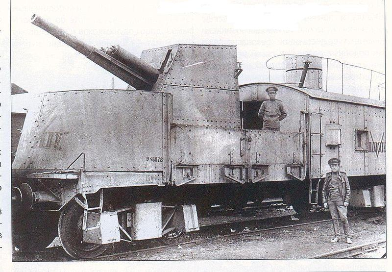 Бронепоезд на Москву